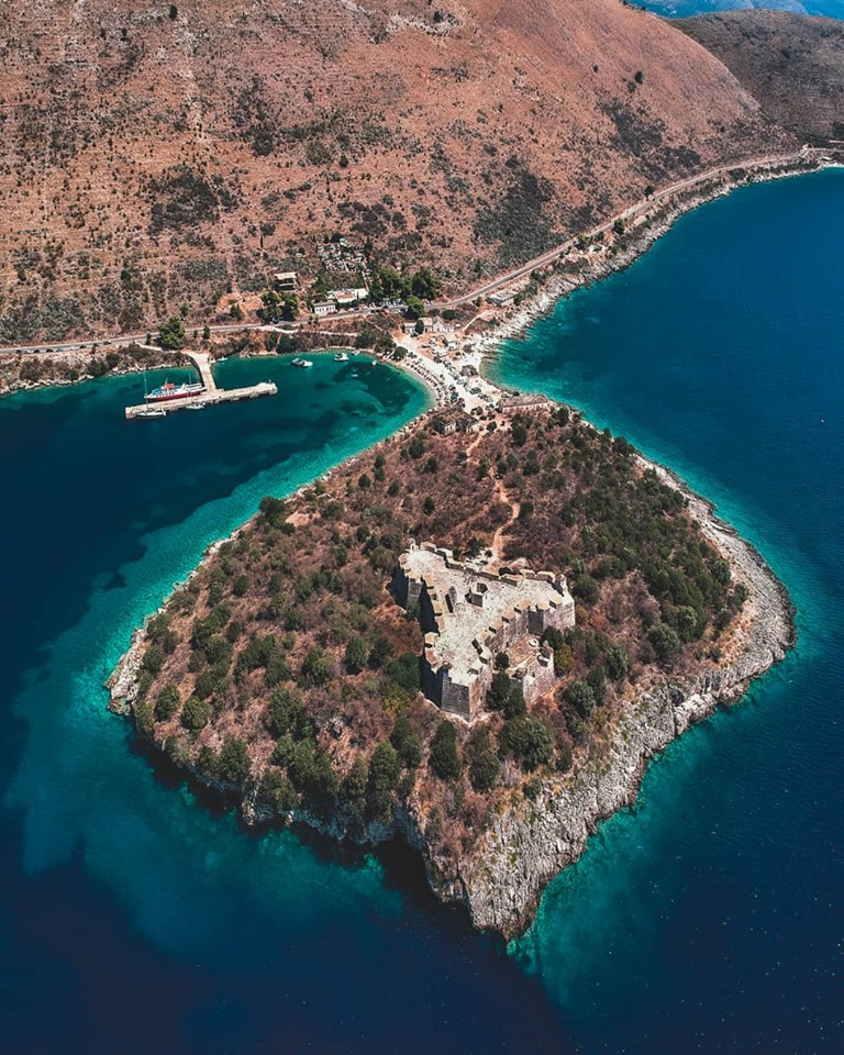 Himara Albanija